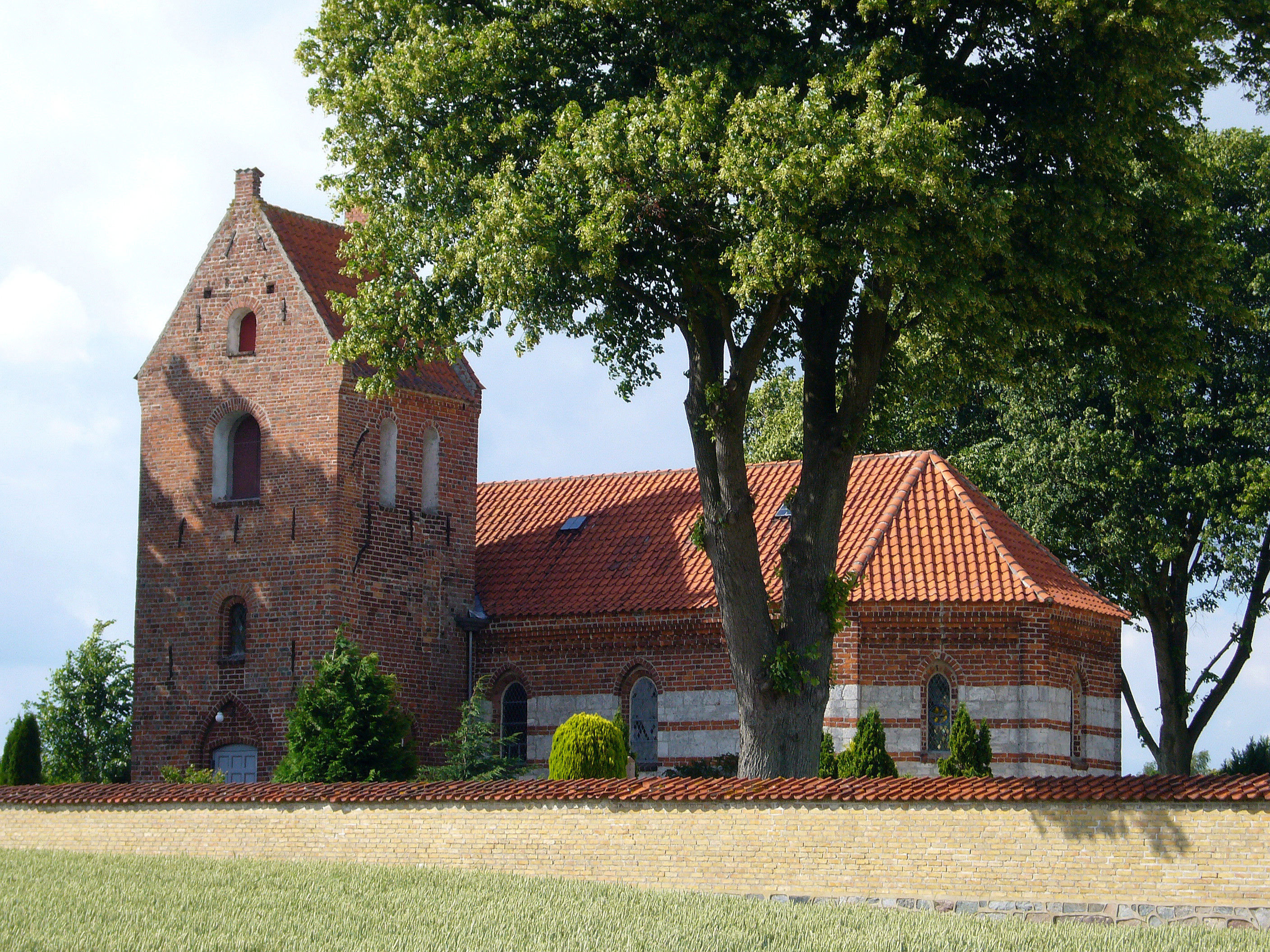 Kirke Skensved Kirke, Roskilde County, Denmark.